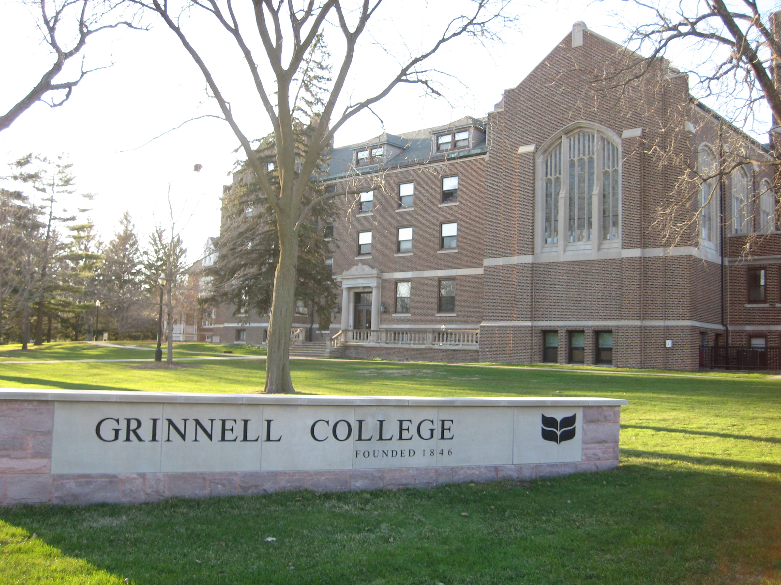 Grinnell College - Main Hall